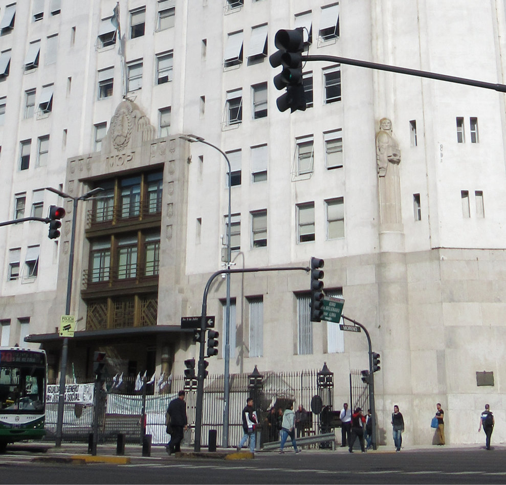 Buenos Aireseko Obra Publikoen Ministerioaren eraikinaren fatxada nagusia.